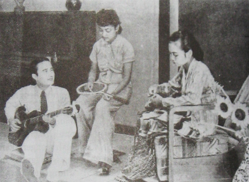 Film still from Djantoeng Hati.